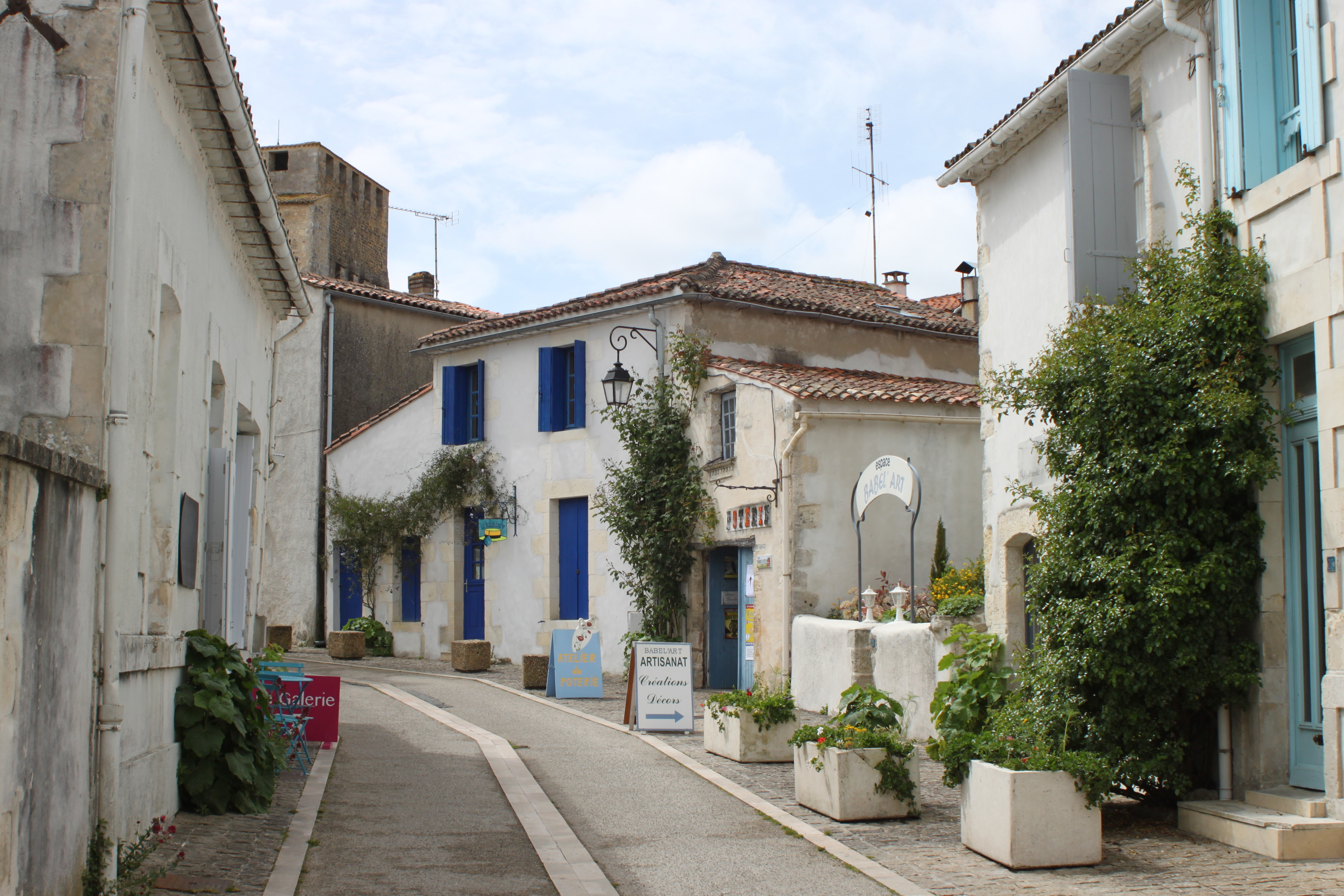 Rue du Lavoir, Fr-17-Mornac-sur-Seudre.